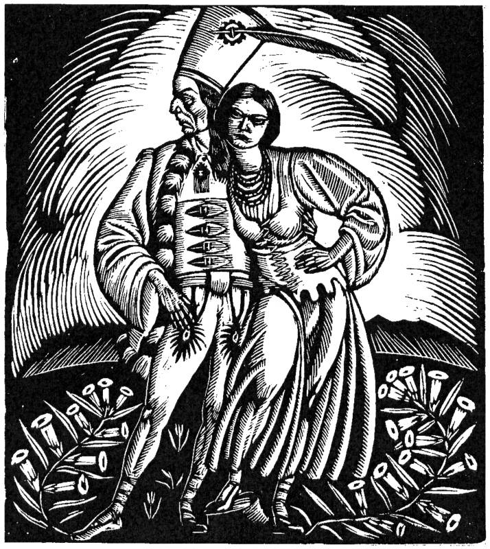 Janosik z frajerką, wood engraving, Muzeum Żup Krakowskich w Wieliczce